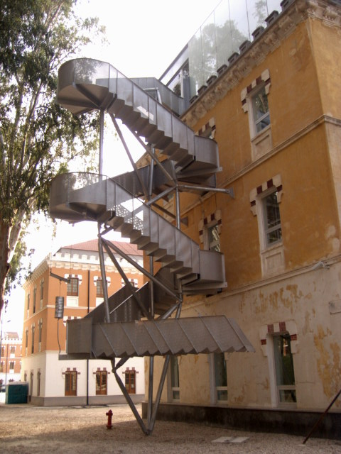 Centro Parraga Murcia